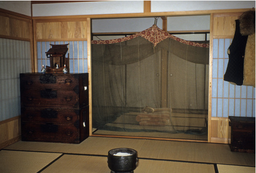 Kaya 蚊帳